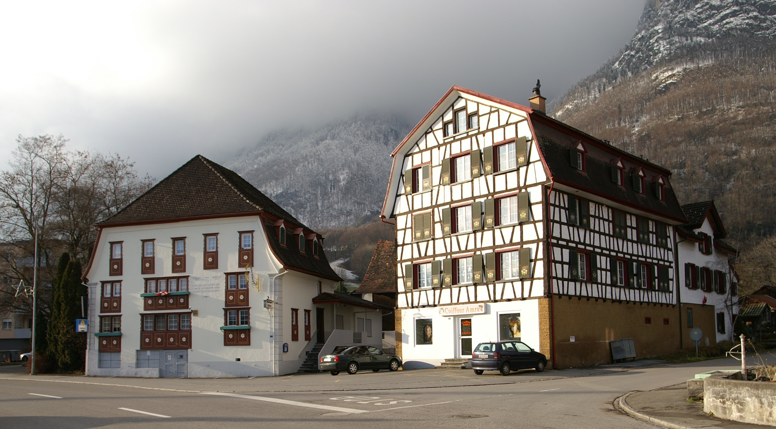 Haus in Zentrum von Sennwald im Rheintal.